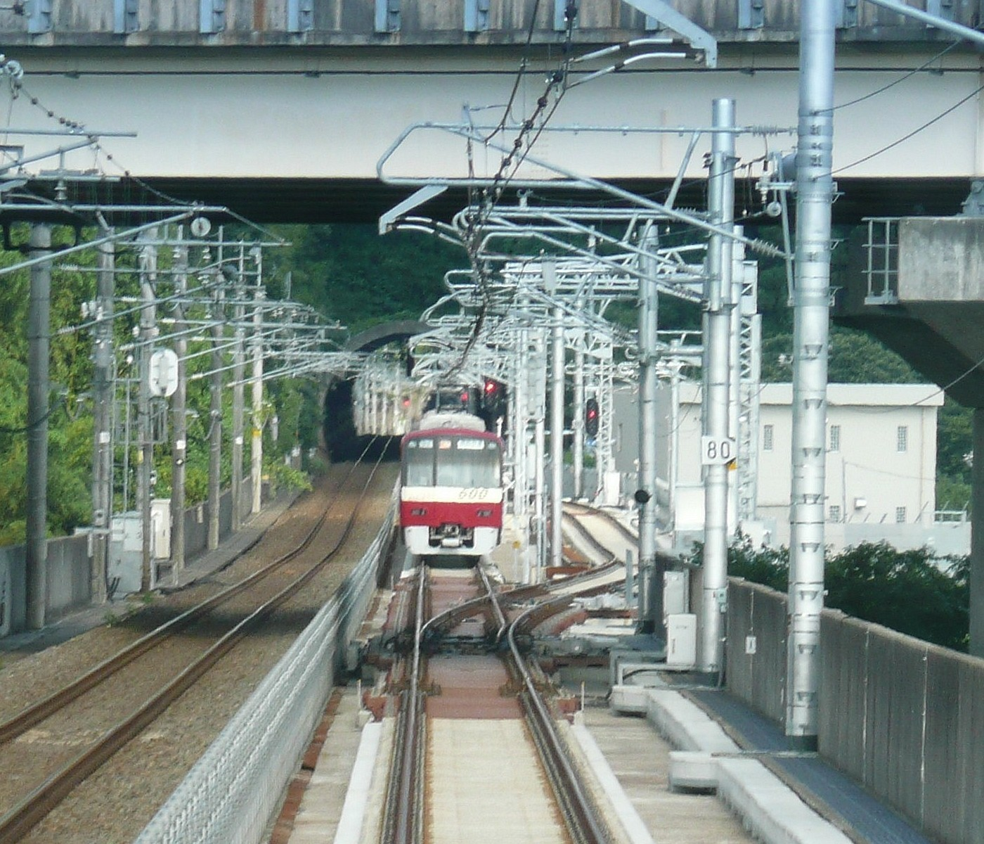 新根古屋信号場。分岐器のある右側の線路が新根古屋信号場。左側はJR成田線。